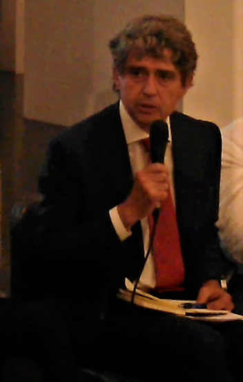 Alessandro Cassinis ad un convegno a palazzo Ducale 16 giugno 2016